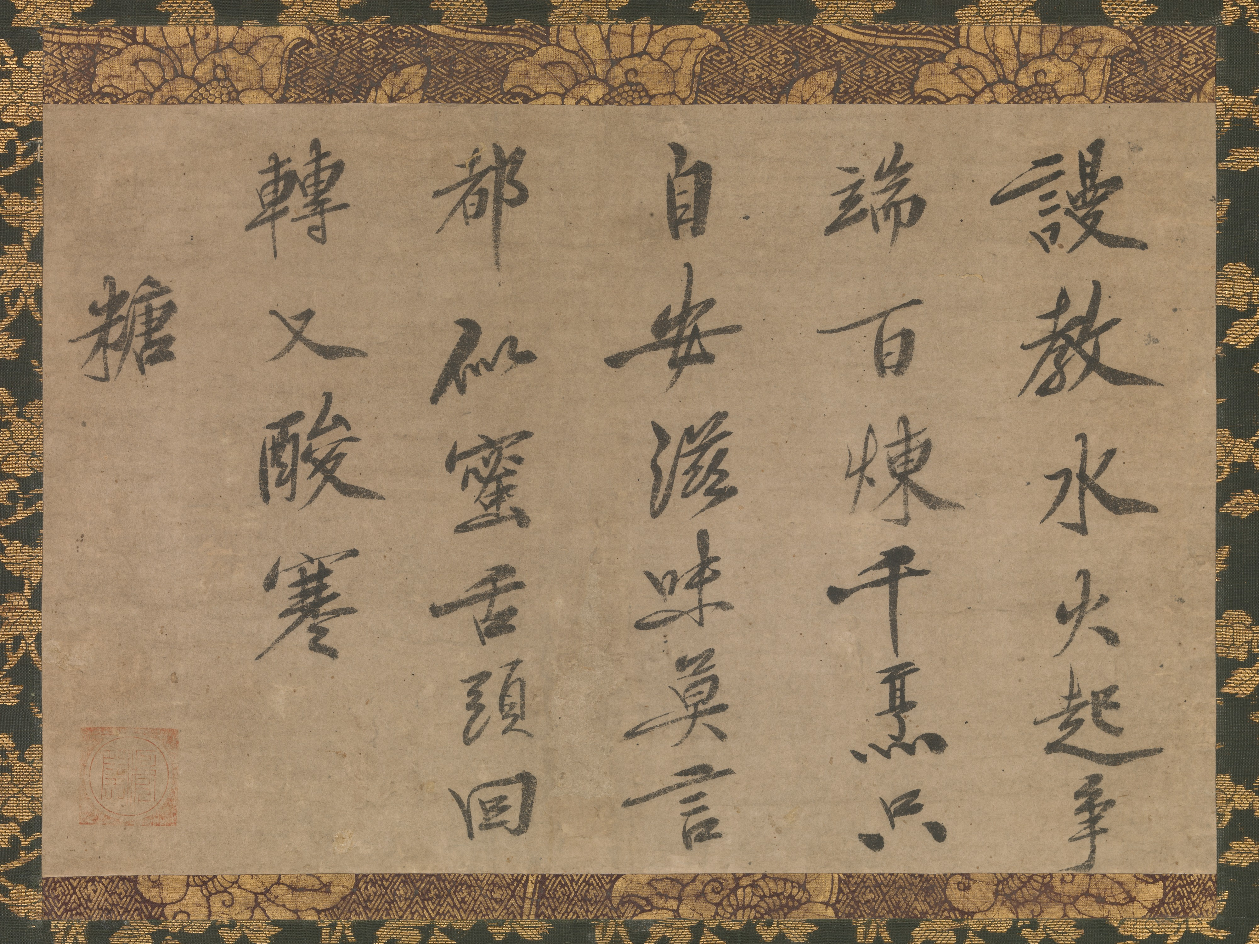 Japan; Hanging scroll; Calligraphy